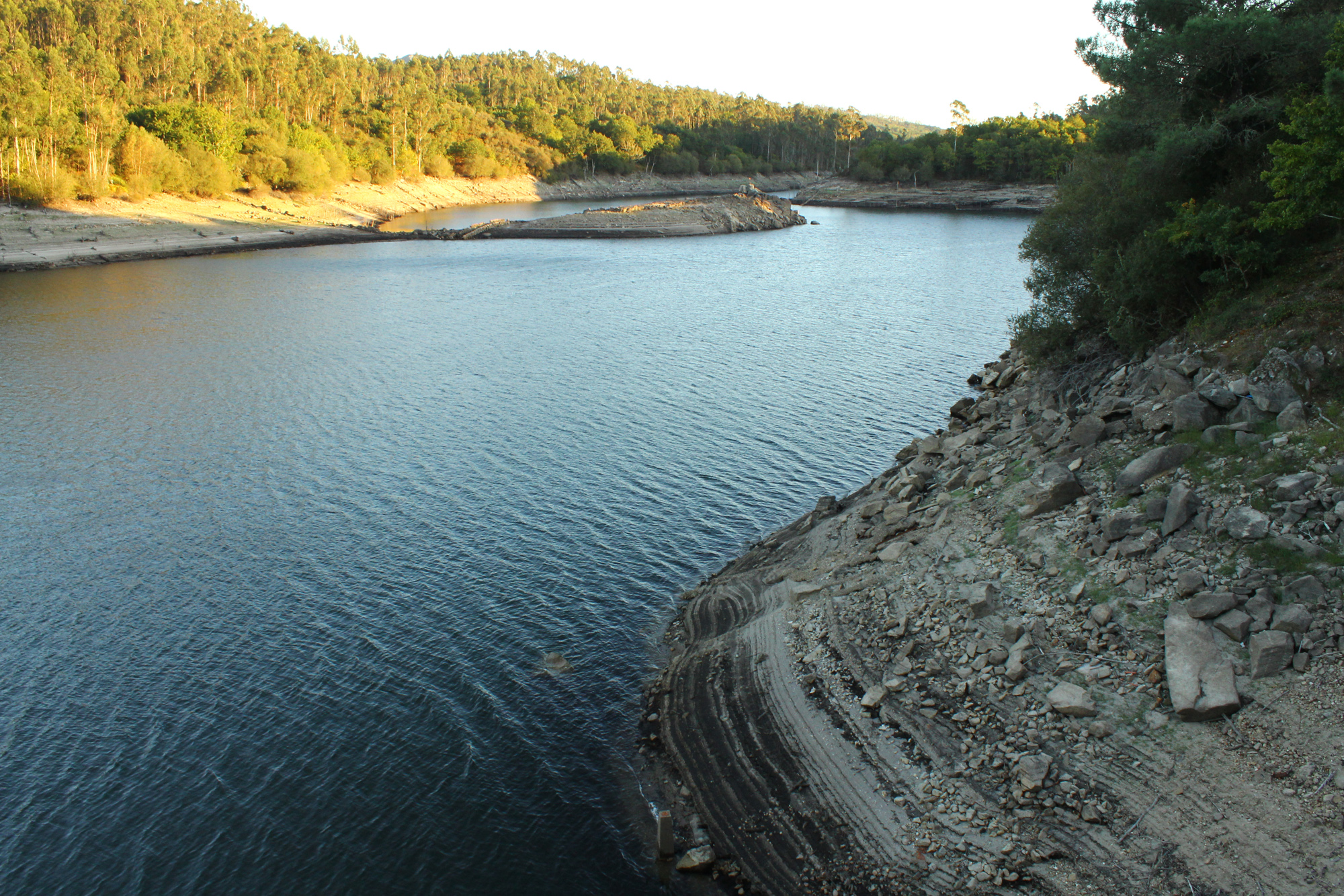 Presa de Eiras, en Fornelos de Montes (Galicia, España). Desde su inauguración en 1977, este embalse suministra agua a Vigo, la principal ciudad de la región. La presa está situada en el curso del río Oitavén. En el momento de hacer estas fotos, el embalse estaba al 50% de su capacidad (22 hm3). Eiras Dam Eiras Dam, in Fornelos de Montes (Galicia, Spain). Since its opening in 1977, this reservoir supplies water to Vigo, the main city in the region. The dam is located on the river Oitavén. At the time of these photos, the reservoir was at 50% capacity (22 hm3).